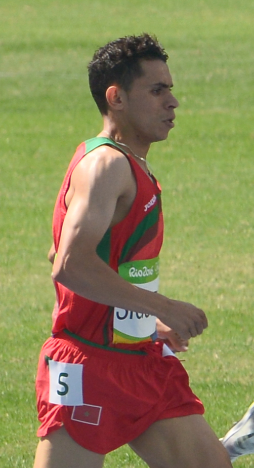 Série du 3000m steeple Homme des JO de Rio, 2016